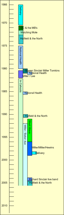 Bands waarin Phil Miller speelde eigen werk